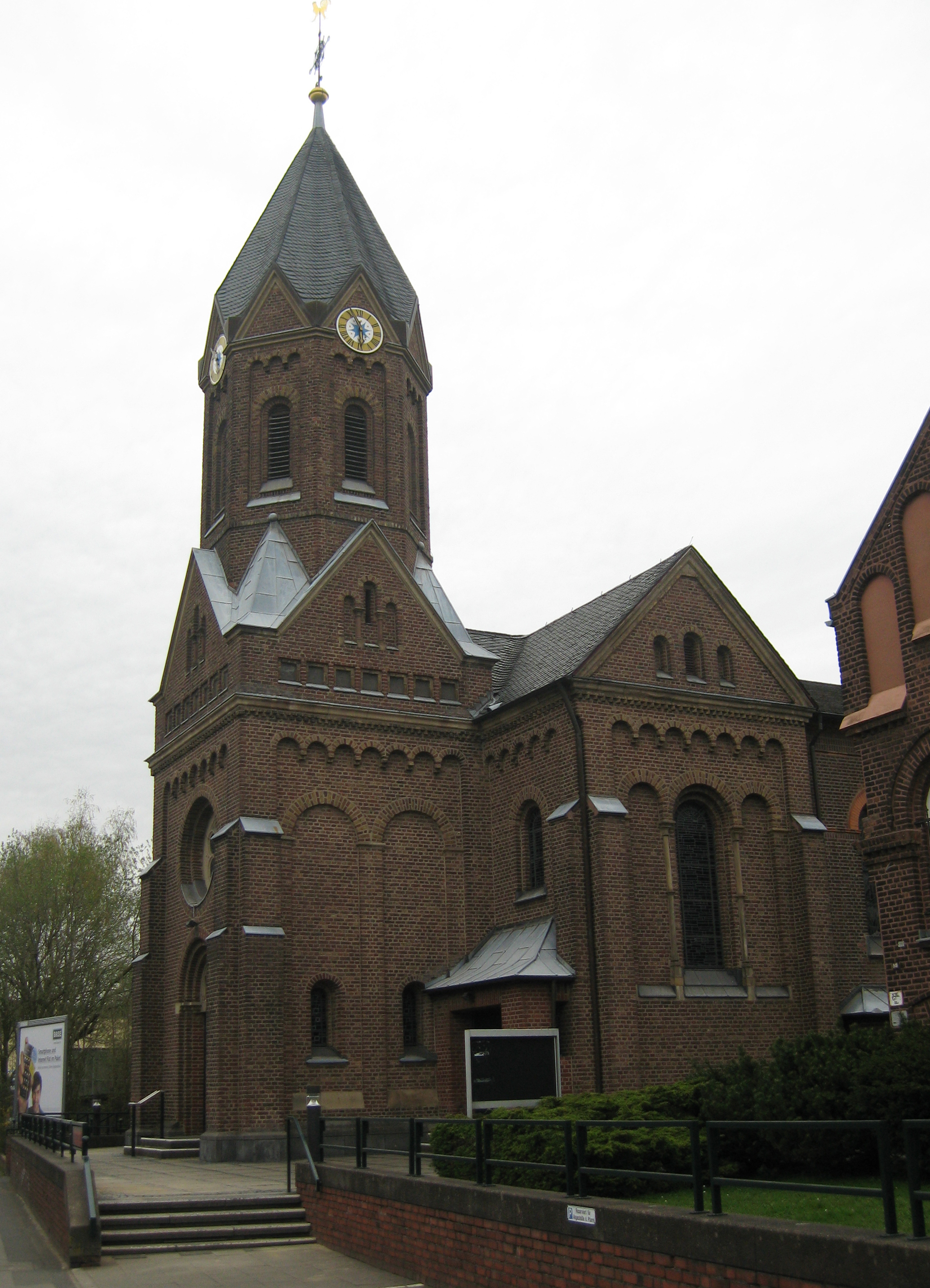 Kirche St. Cornelius in Köln-Rath/Heumar Datum: 05.04.2011 Urheber: M. Pfeiffer alias Benutzer:Gordito1869 Quelle: privates Fotoarchiv des Urhebers This is a photograph of an architectural monument.